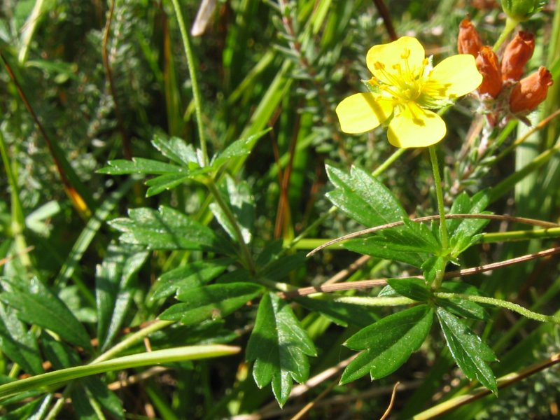 Blutwurz Potentilla erecta, Hiddensee